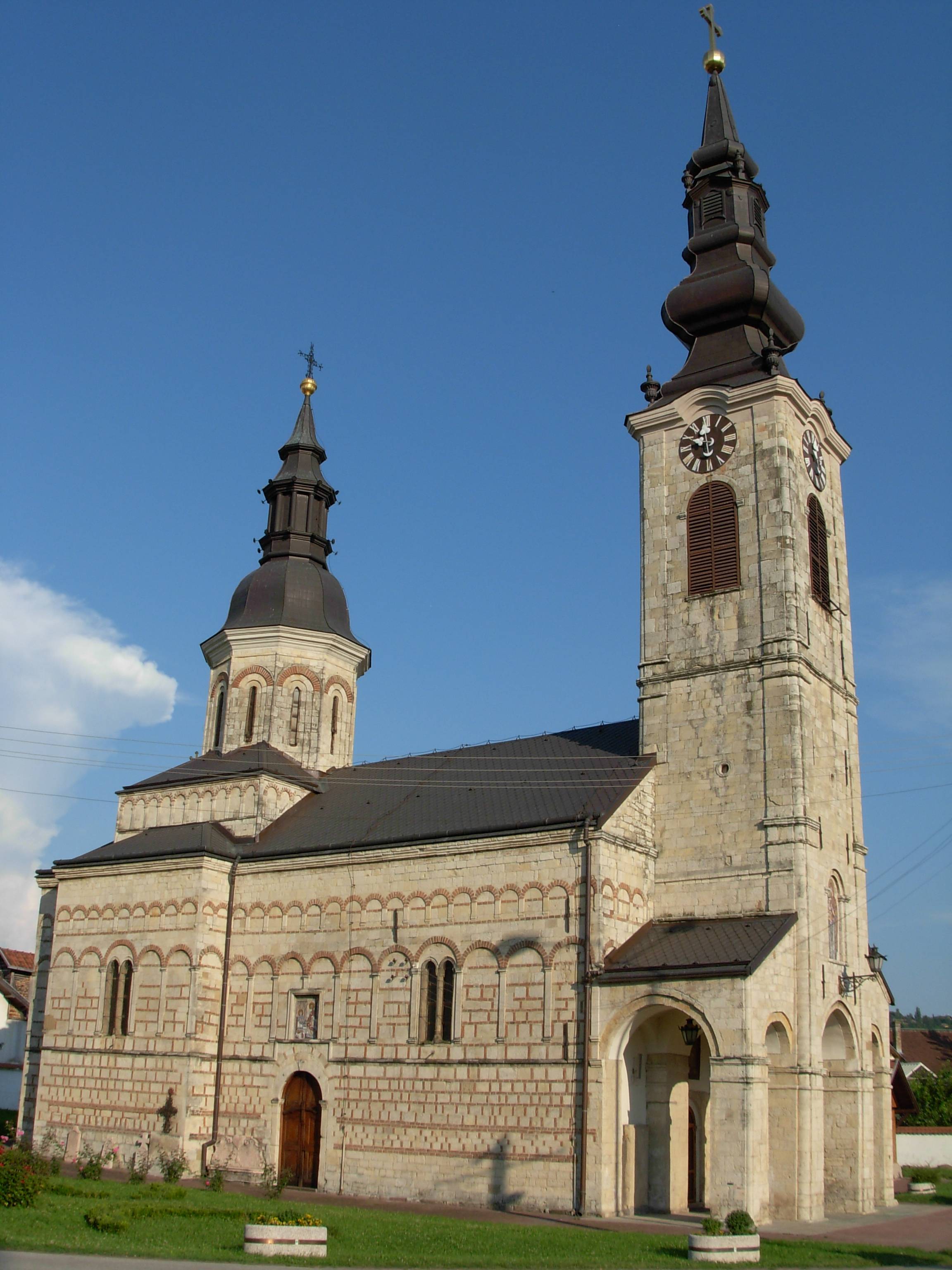 Crkva Rođenja presvete Bogorodice u Sremskoj Kamenici.